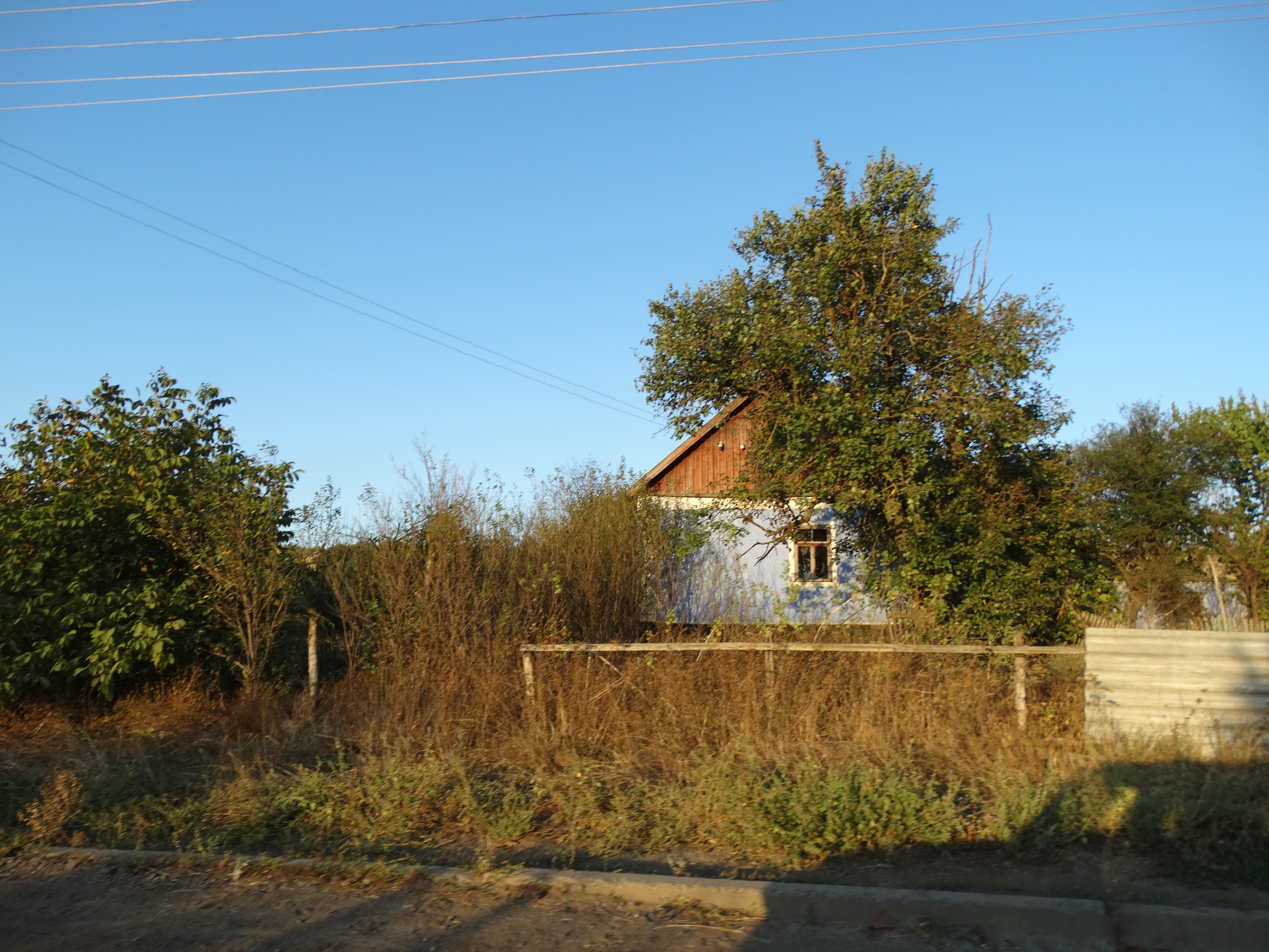 Вікіекспедиція на Північ Одещини